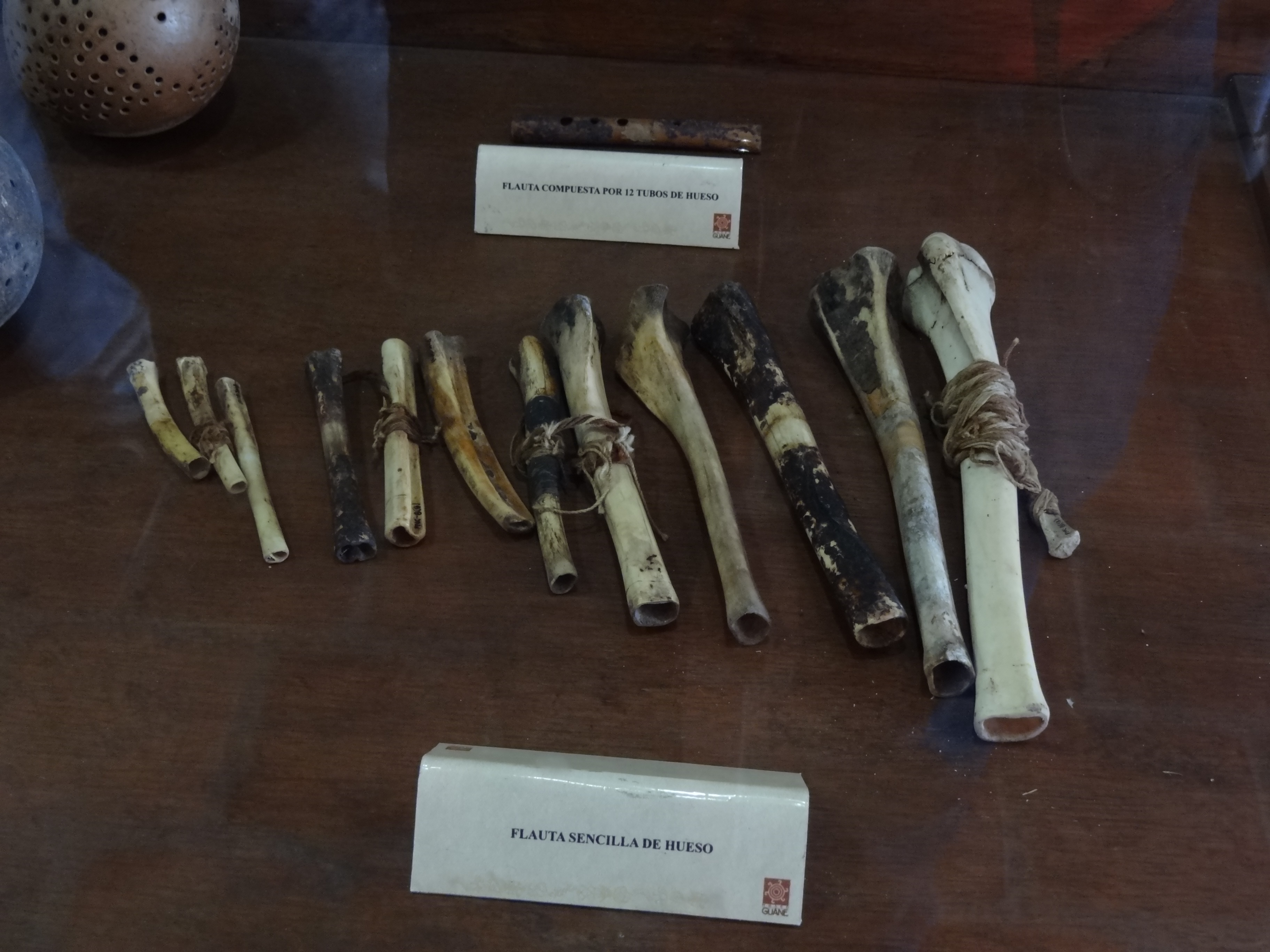 Instrumentos musicales fabricados en hueso por los Guanes, exhibidos en el Parque Nacional del Chicamocha